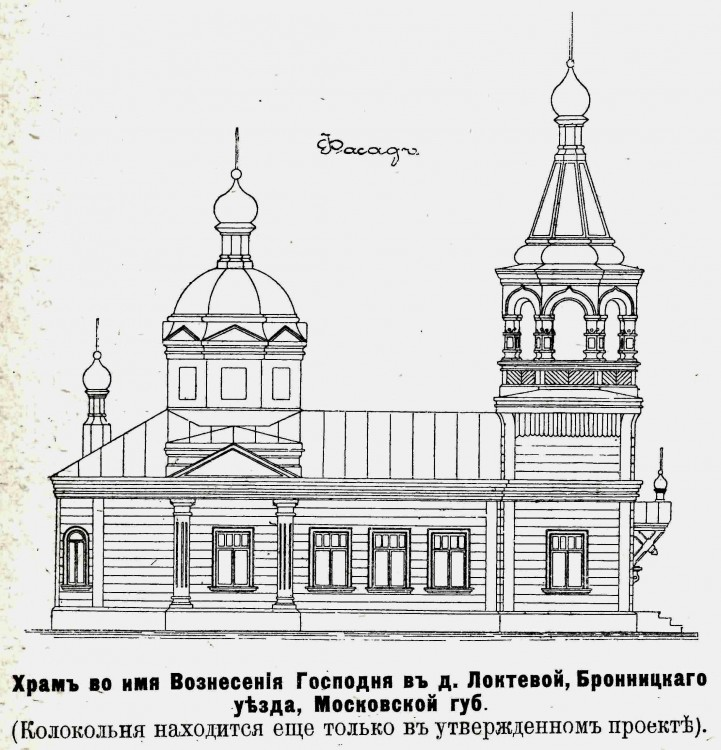 Чертеж старообрядческого Храма во имя Вознесения Господня в д. Локтевой Бронницкого уезда Московской губернии